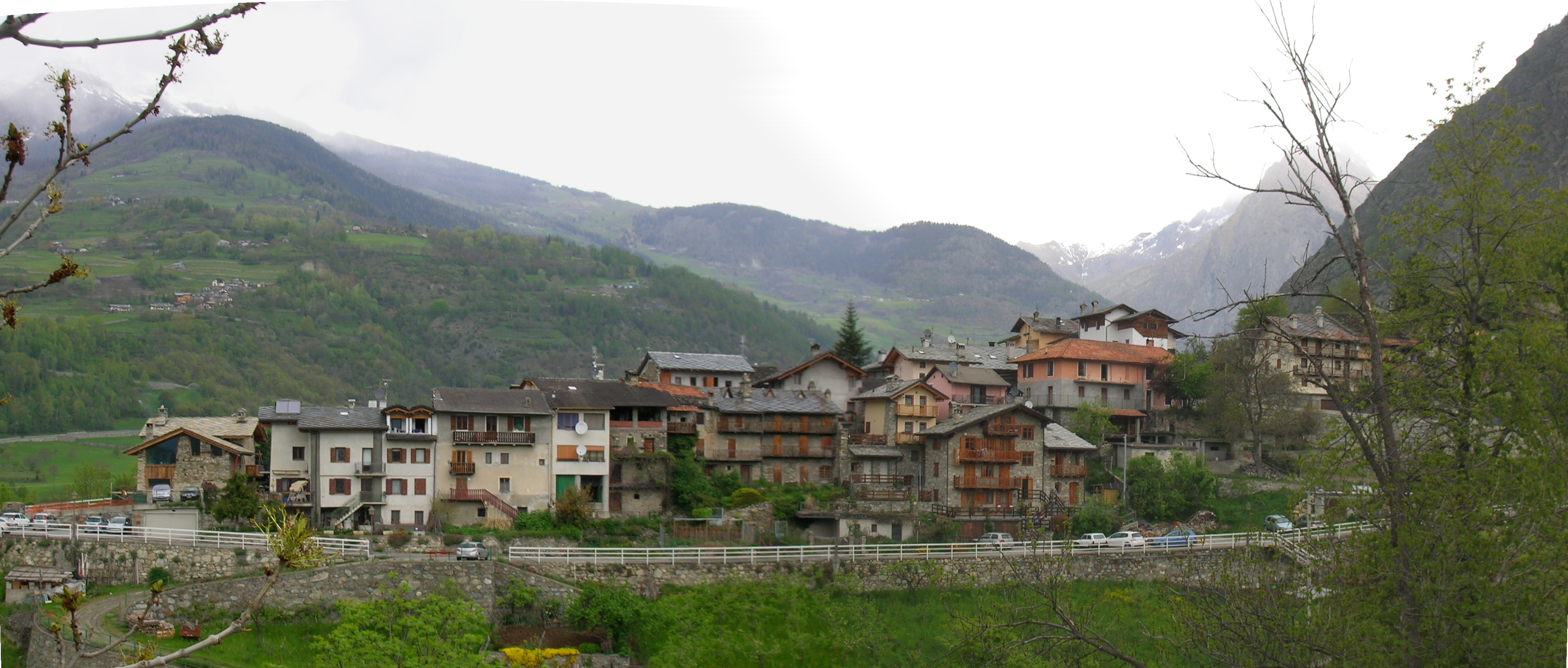 Roisan, Valle d'Aosta, Italia.